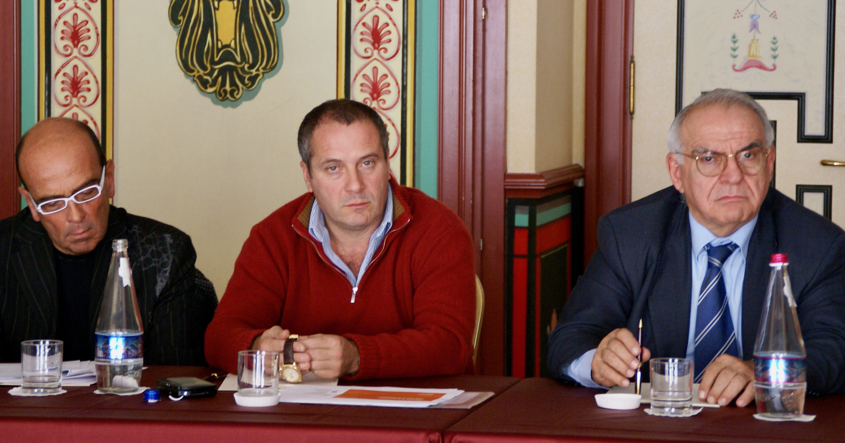 Relatori